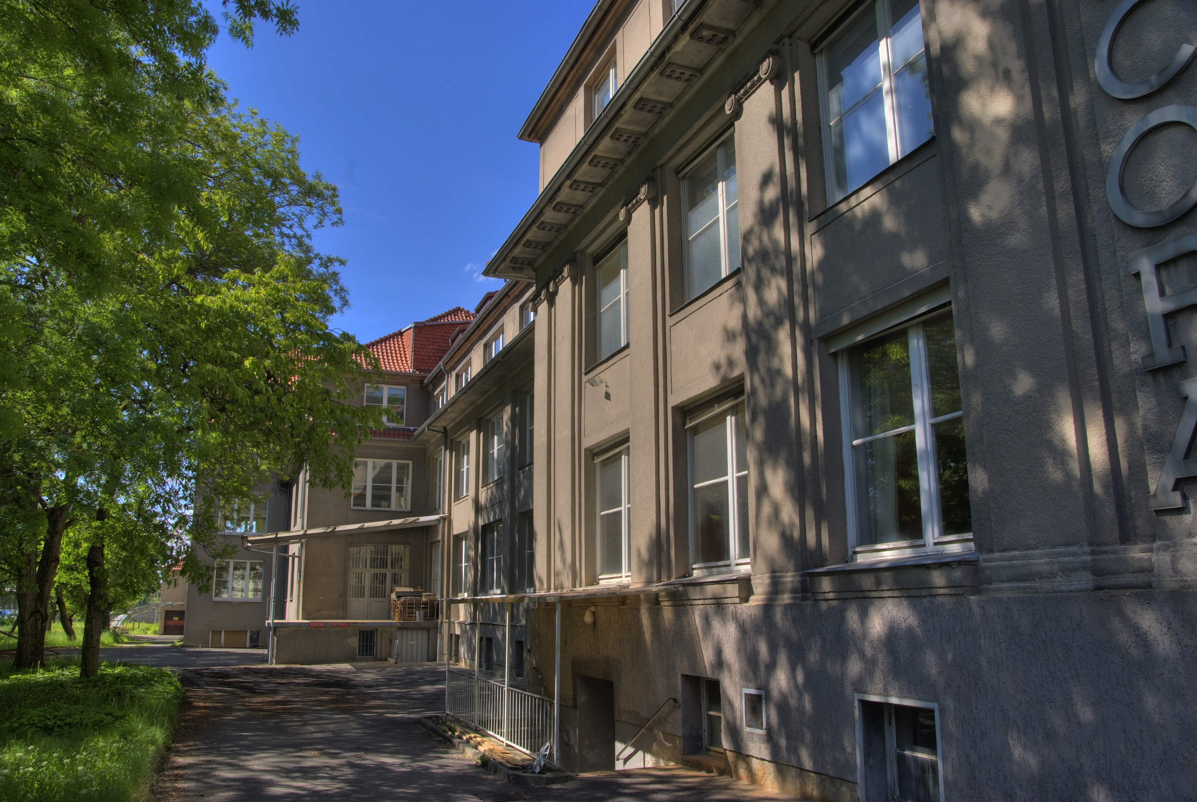 Escora Gebäude in der Rosenauer Straße 27 in Coburg. HDR Aufnahme.